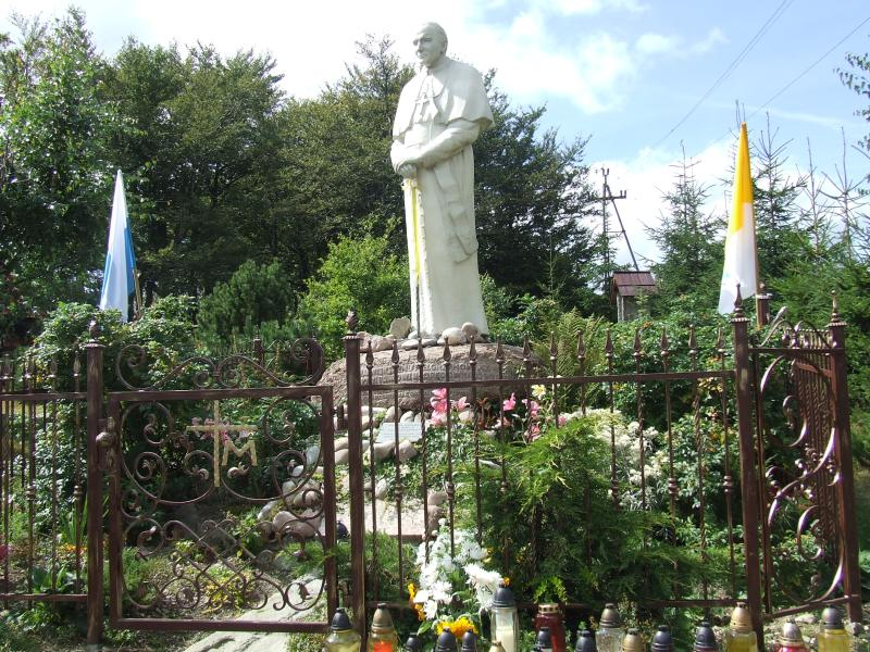 Pomnik koło Kaplicy na Groniu Jana Pawła II